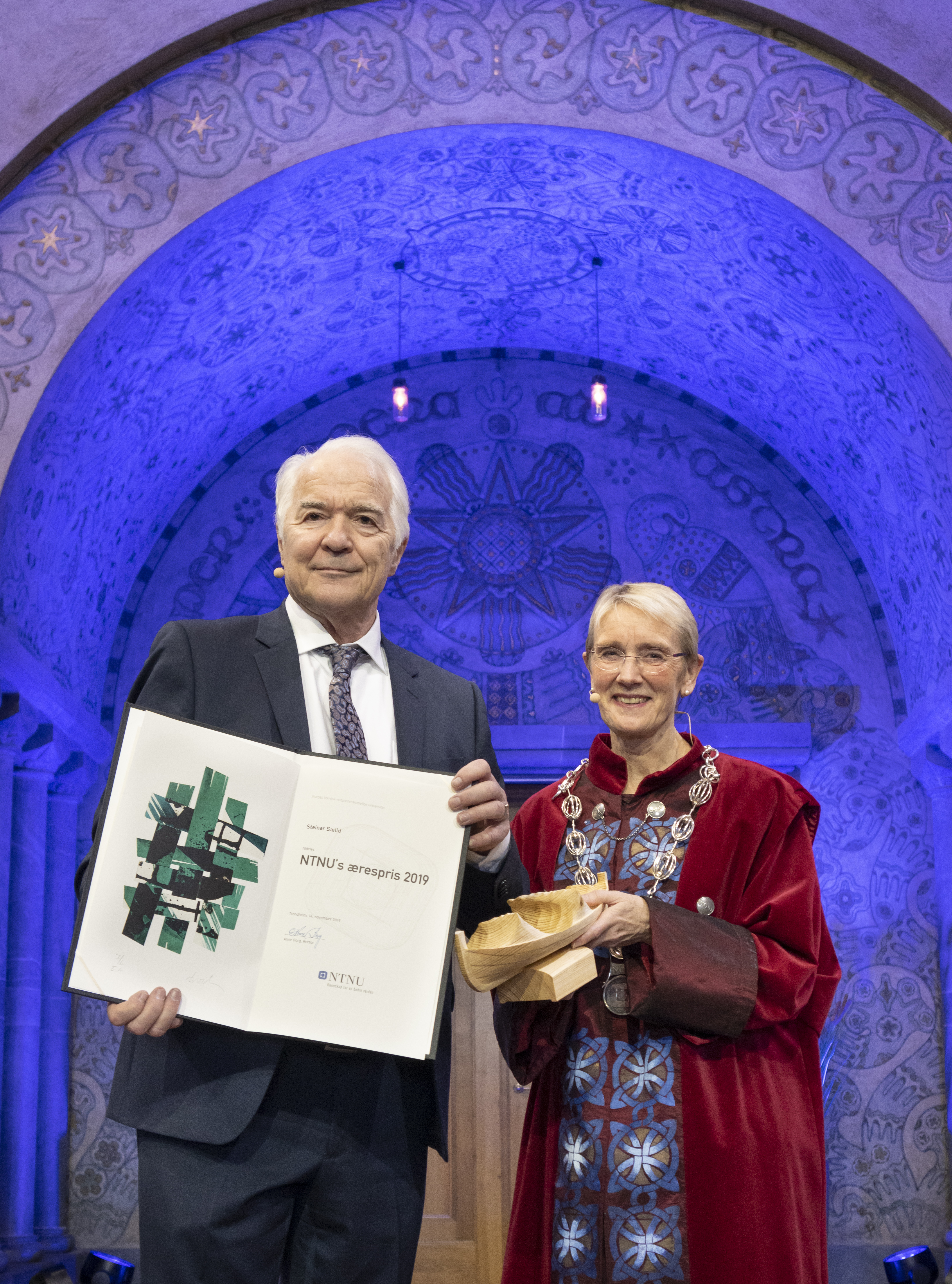 Trondheim 14.11.2019 : NTNUs doktorpromosjon i Hovedbyggets aula på Gløshaugen. Nye doktorer kreeres og NTNUs ærespris utdeles til forsker og gründer Steinar Sælid. Foto: Thor Nielsen / NTNU